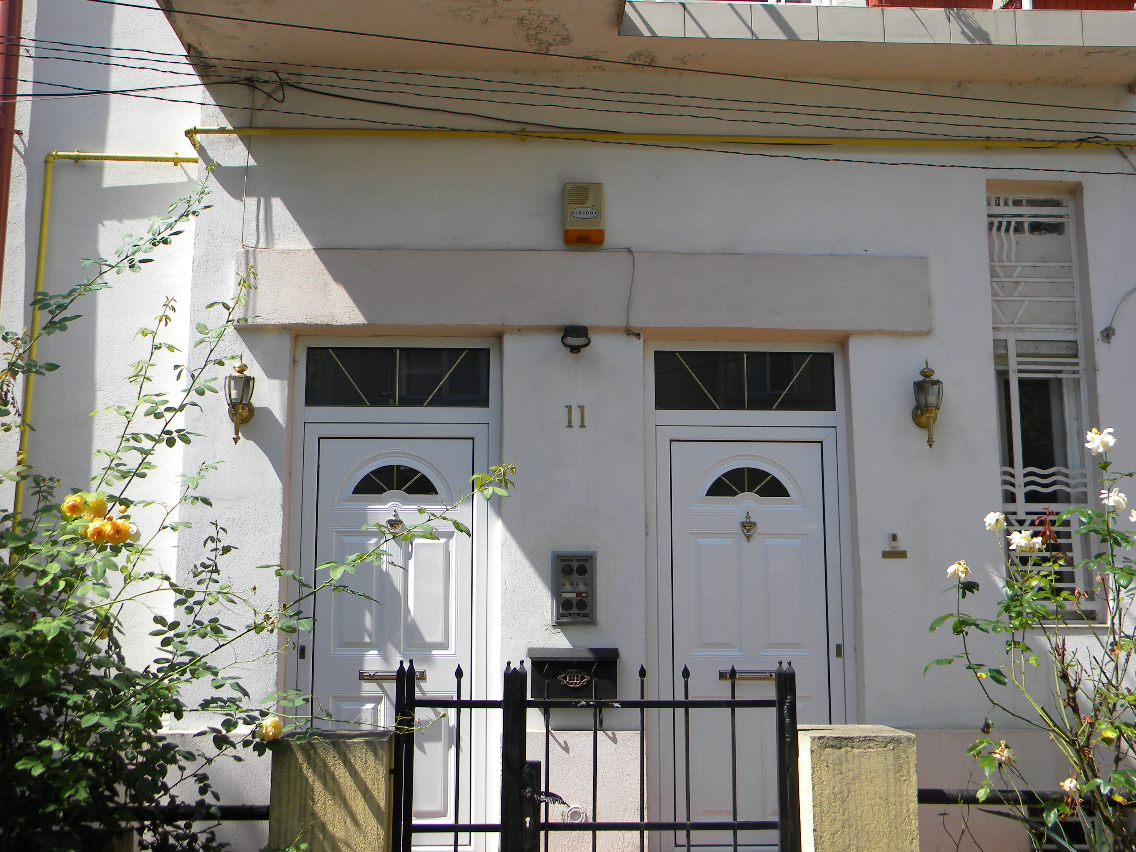 Bucuresti, Romania, Imobilul nr. 11 de pe Str. Naum Ramniceanu; B-II-m-B-19530 (detaliu)